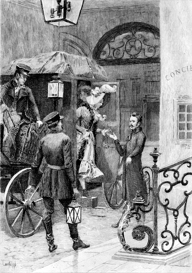 Title page of Honoré de Balzac's La Rabouilleuse (1834).